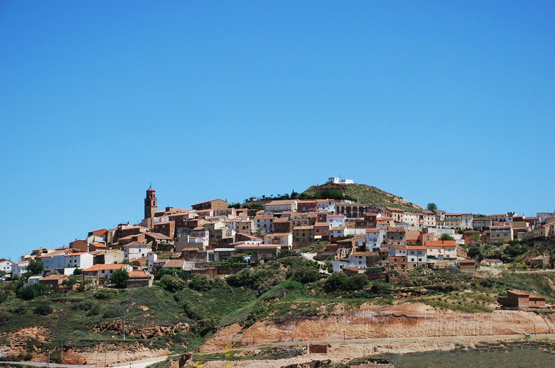 Vista general de Ausejo